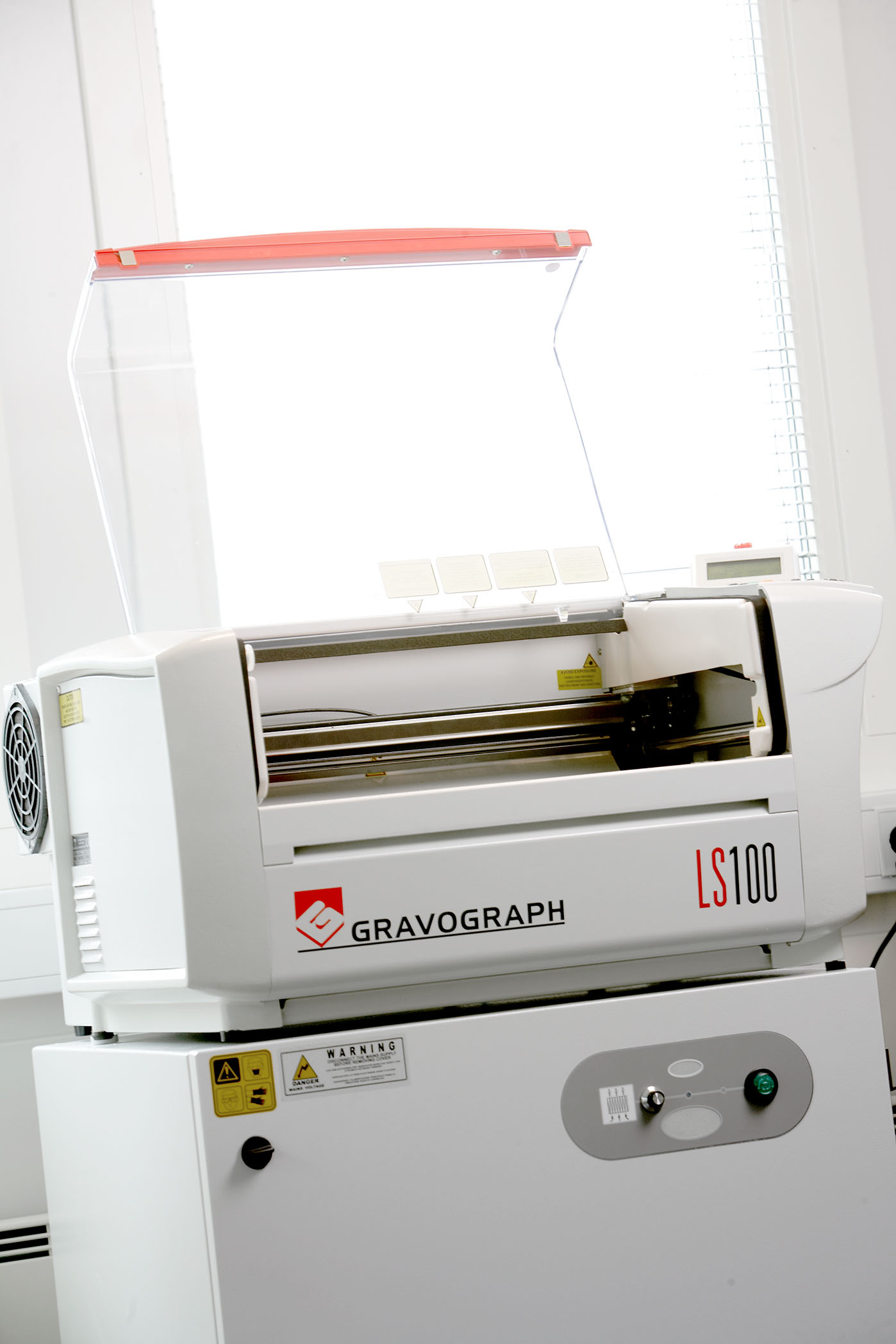 En typisk Co2 laser graveringsmaskin